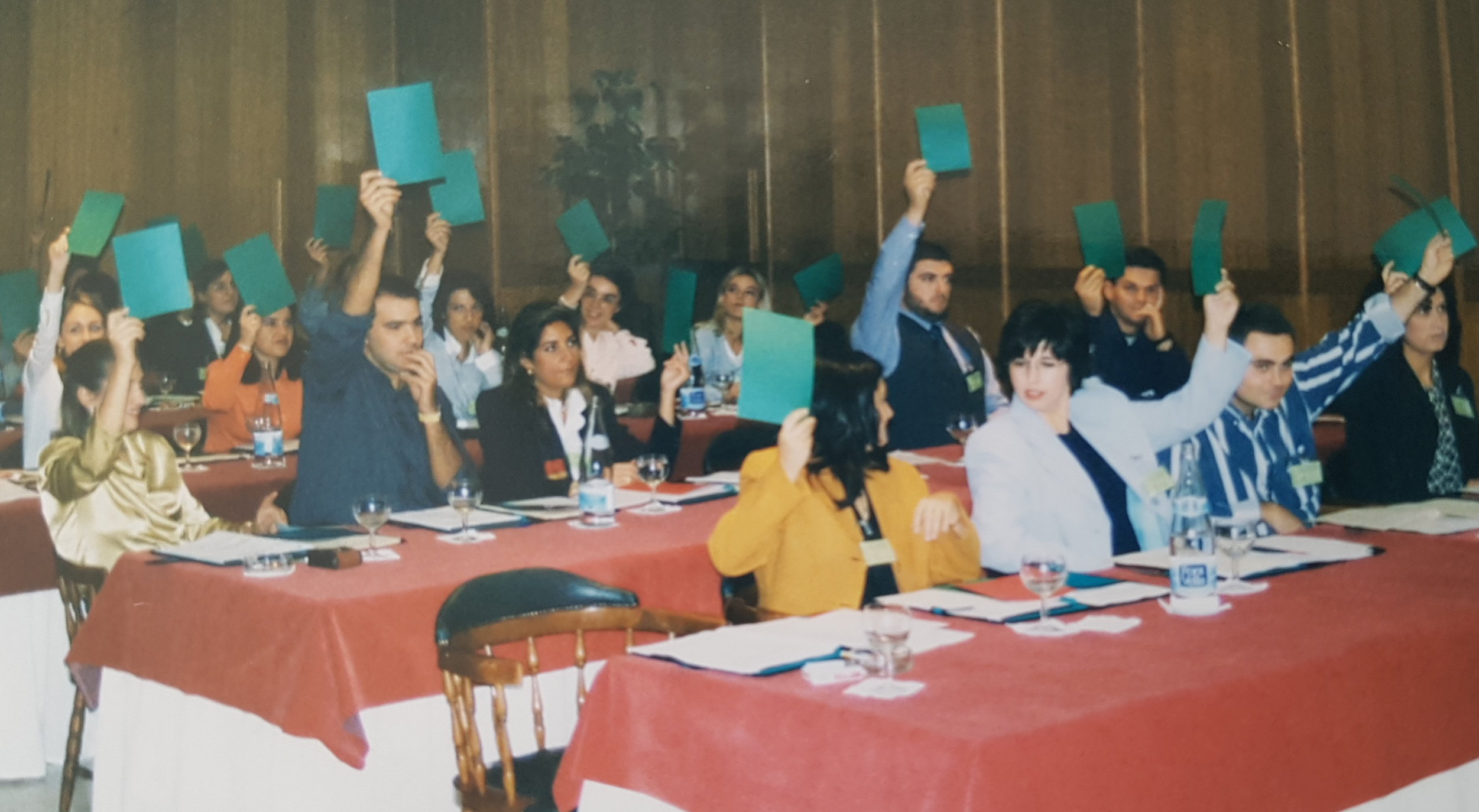 Congresos Constituyentes Fetico años 90